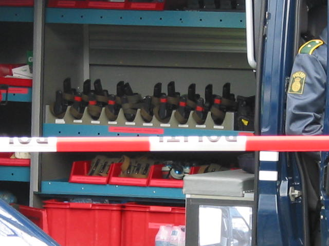 kig ind i københavns politis materielvogn